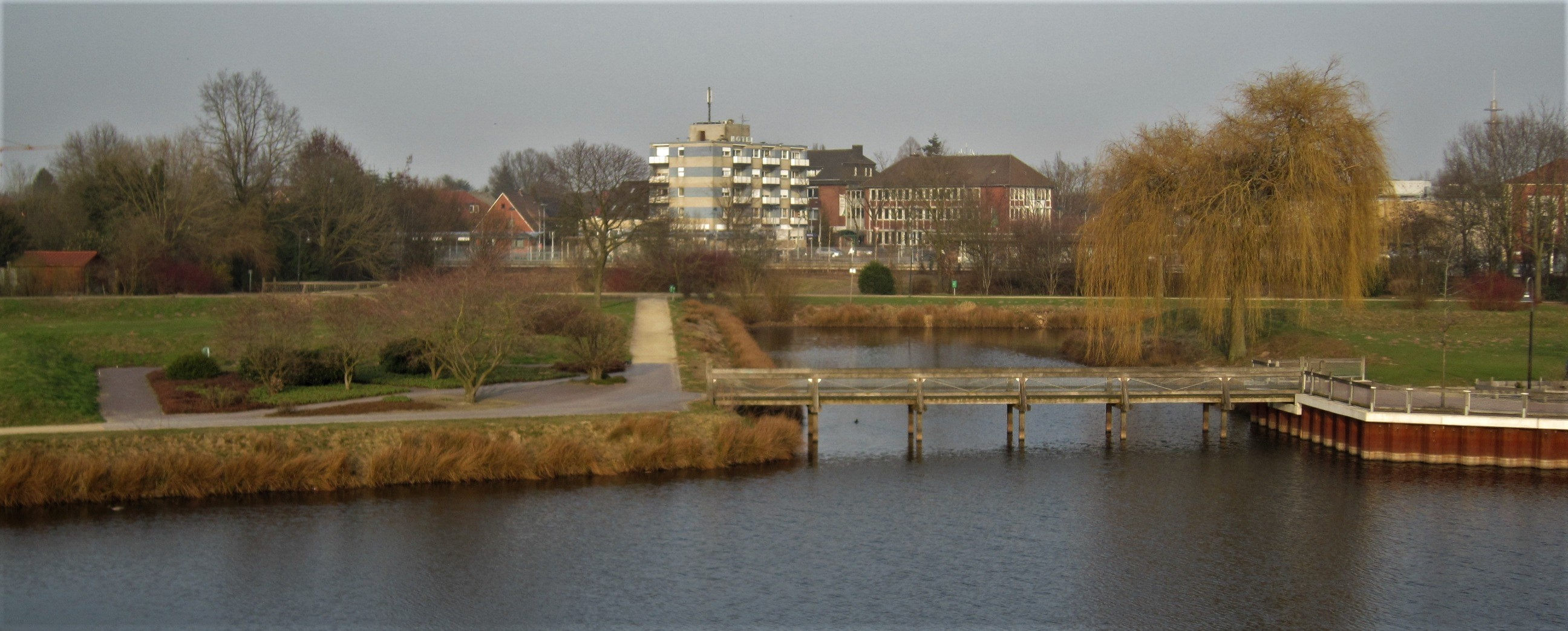 Östlicher Teil des Zitadellenparks Vechta im März 2012, kurz vor den Arbeiten zur Errichtung des Castrum Vechtense